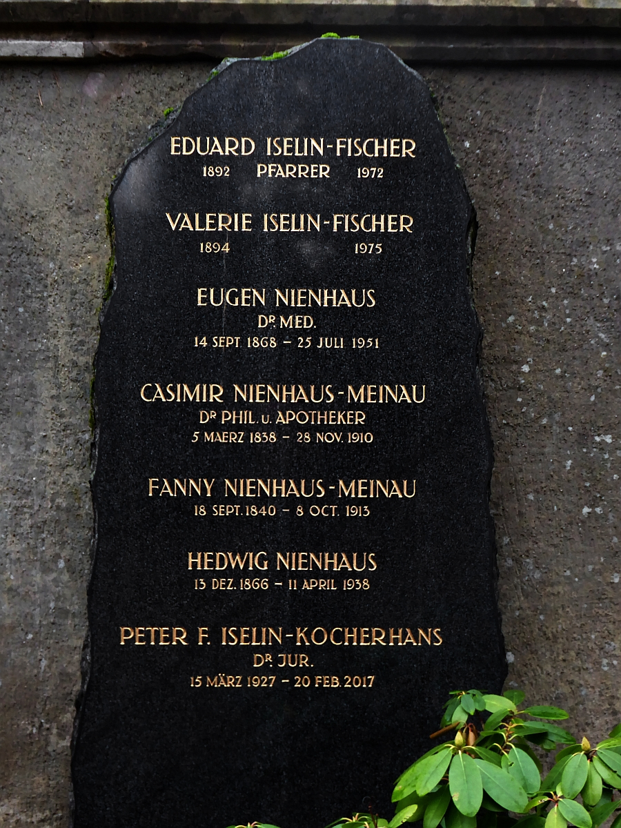 Kasimir Nienhaus-Meinau (1838–1910) Dr.phil., und Apotheker, Dozent für Pharmakognosie und pharmazeutische Chemie an der Universität Basel. Grab auf dem Friedhof Wolfgottesacker, Basel